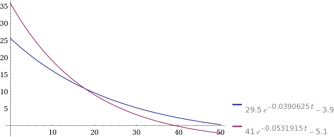 Décroissance température initiale 35°C et 25°C jusqu'au gel, selon arXiv:1310.6514 [physics.chem-ph]